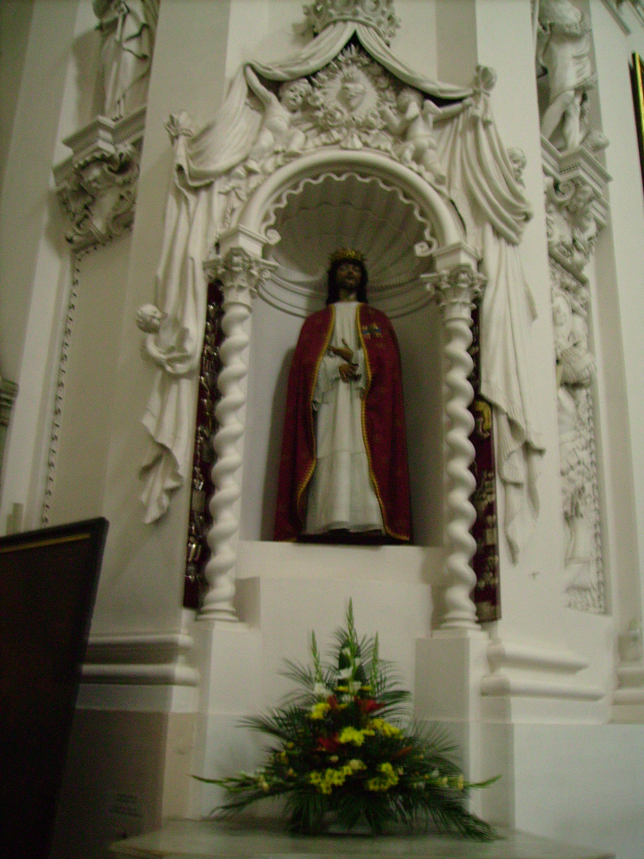 Escultura del Natzarè a la Catedral de Sant Pere i Sant Pau de Vilnius